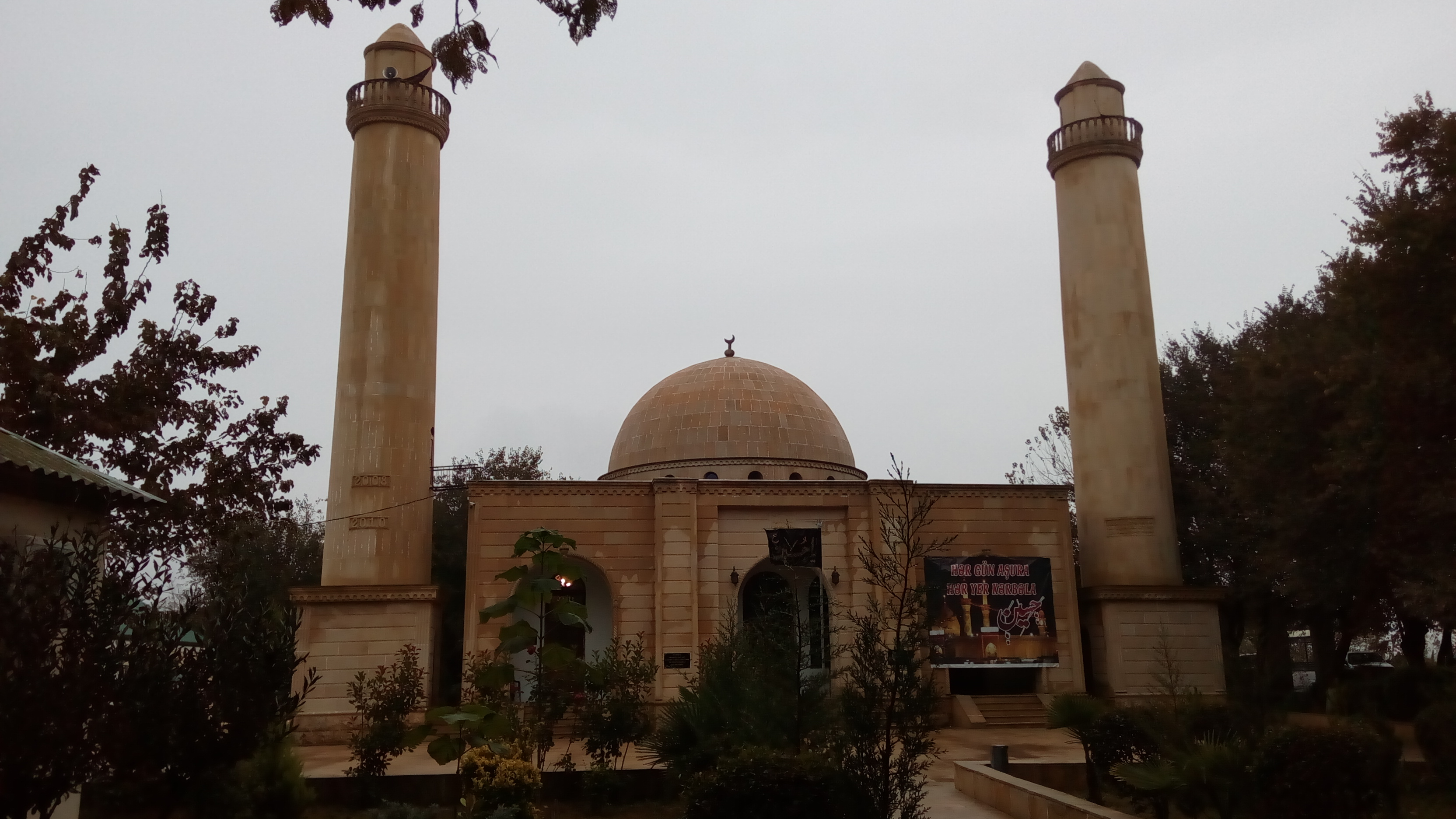 Beyləqan